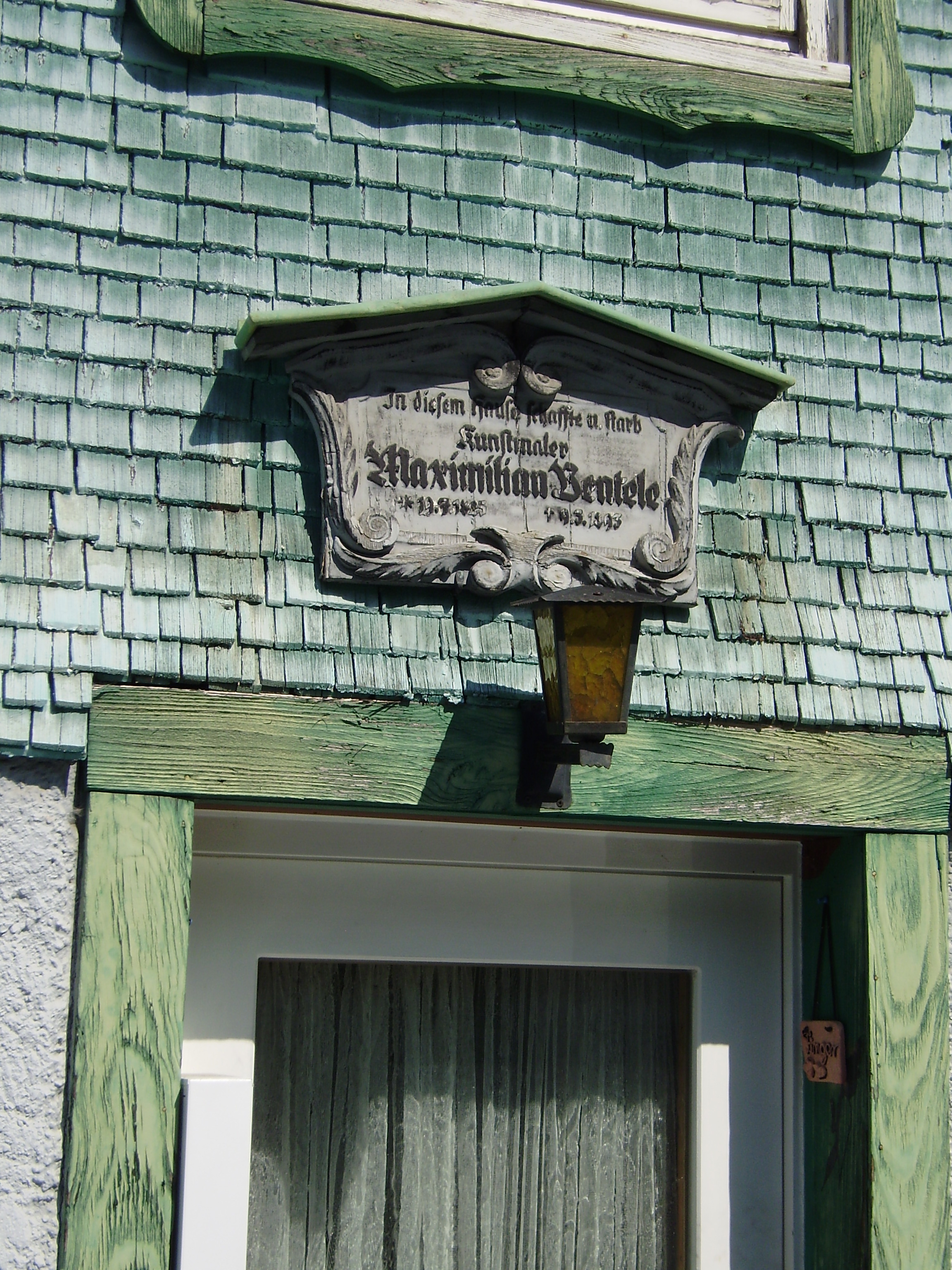 Erinnerungstafel an MaxBentele über seiner Haustür